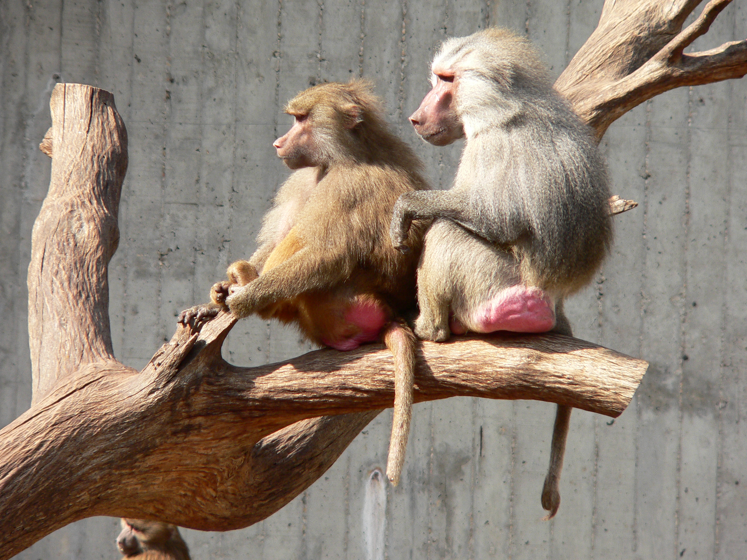 Papio. (Cercopithecidae). Foto tomada por © Manuel González Olaechea y Franco